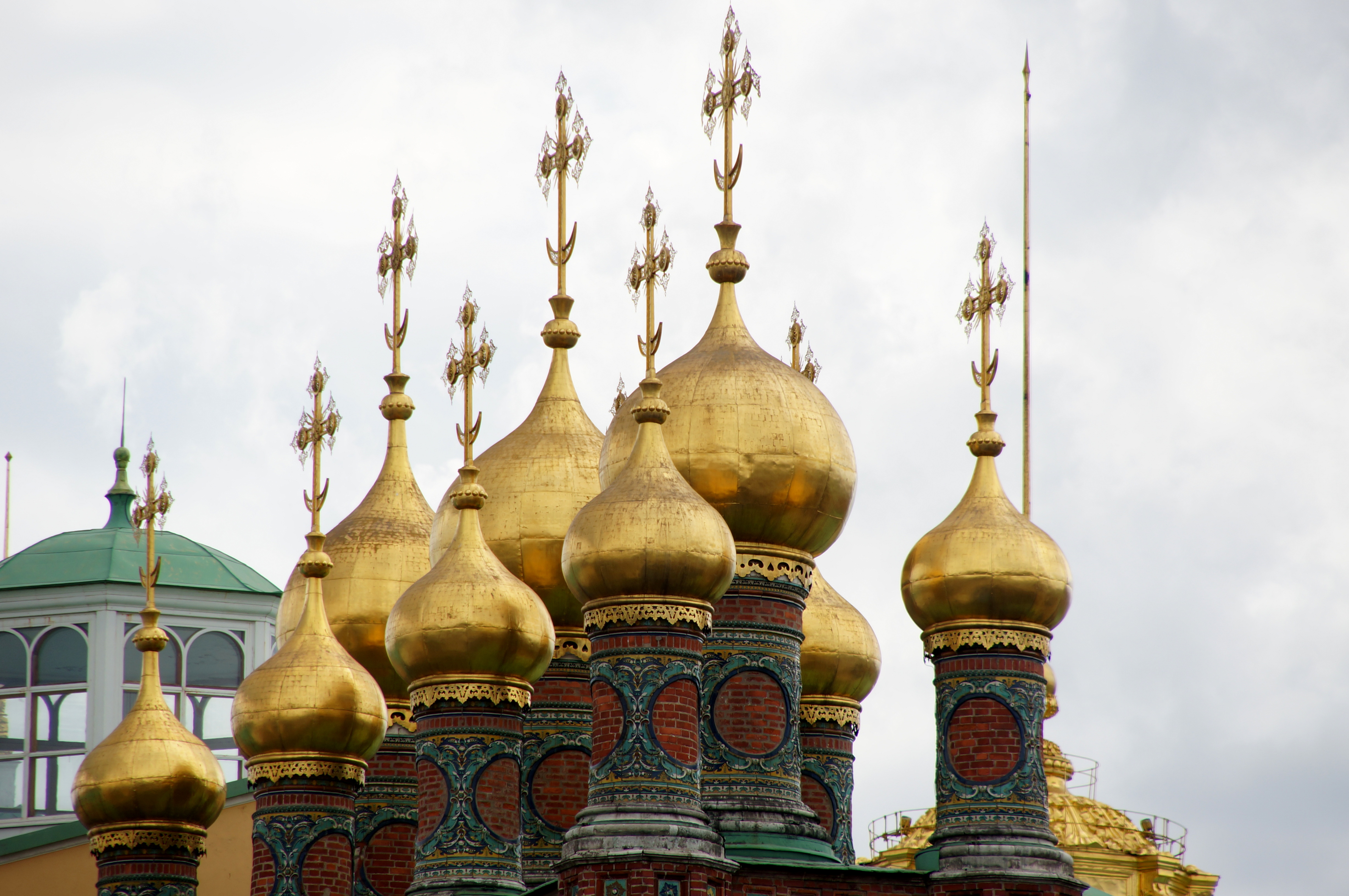 Дворец Теремной с собором Верхоспасским и церквами Воздвижения Креста Господня (Распятия), великомученицы Екатерины, Воскресения Словущего, Рождества Богородицы на Сенях с церковью Воскрешения Лазаря в подклете (Москва и Московская область, Москва, Красная площадь, Кремлевская наб., Александровский сад)